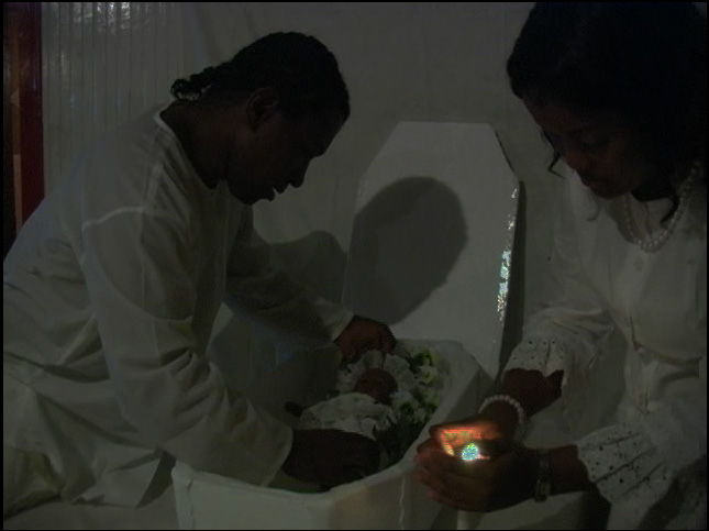 Chigualo: Ceremonia fúnebre del cadáver de un niño en el pacífico colombiano.